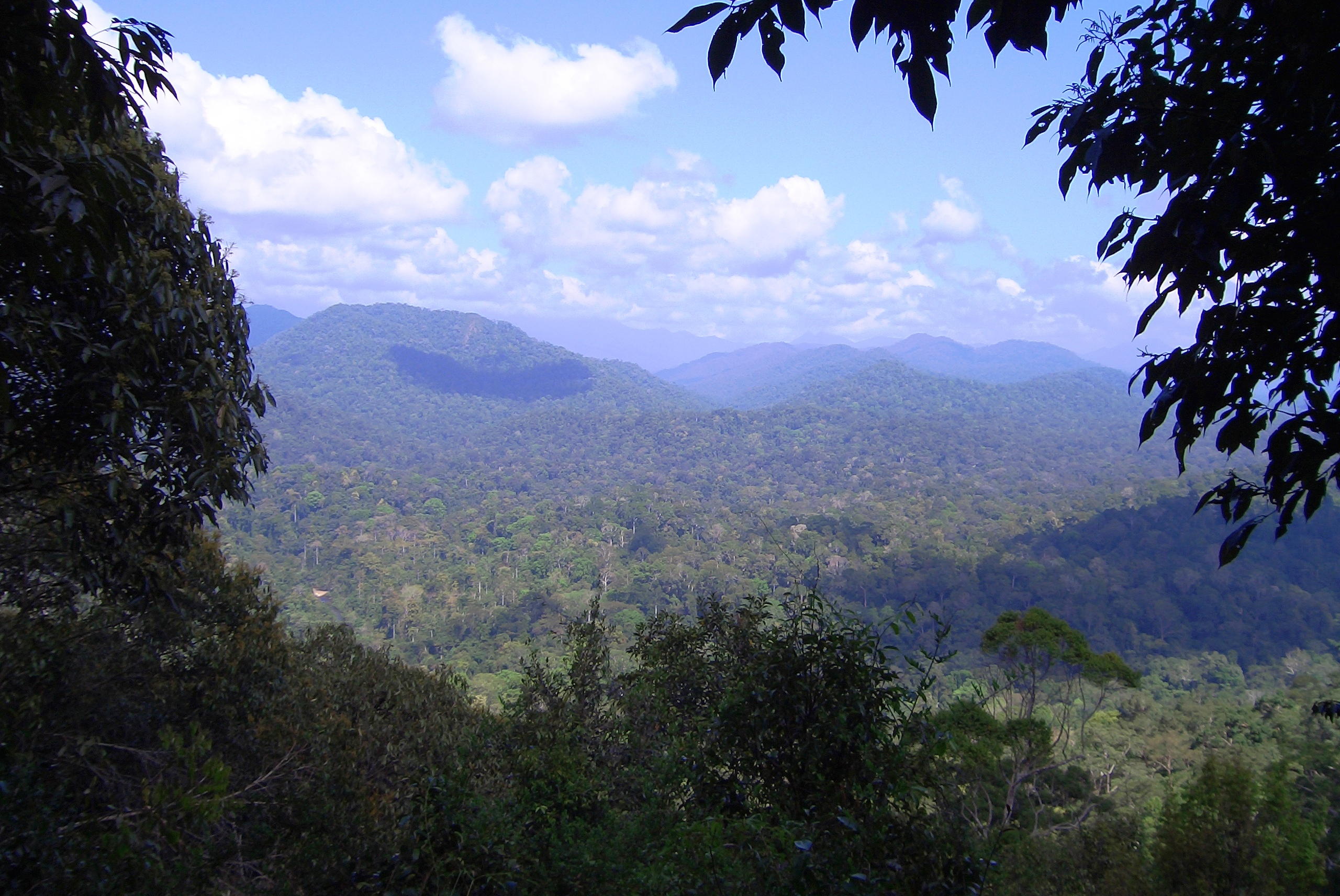 Gunung Tahan mountain as seen from Teresek Hill in Taman Negara National Park, Malaysia